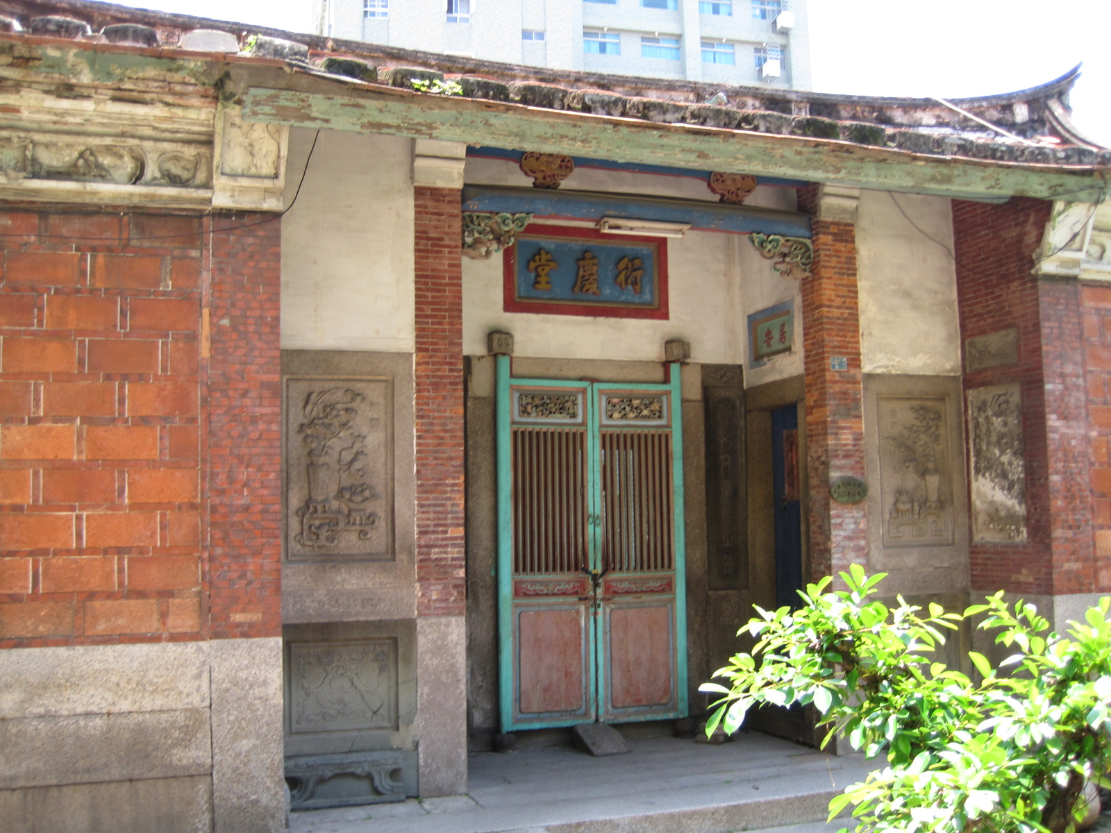 臺南石鼎美古宅